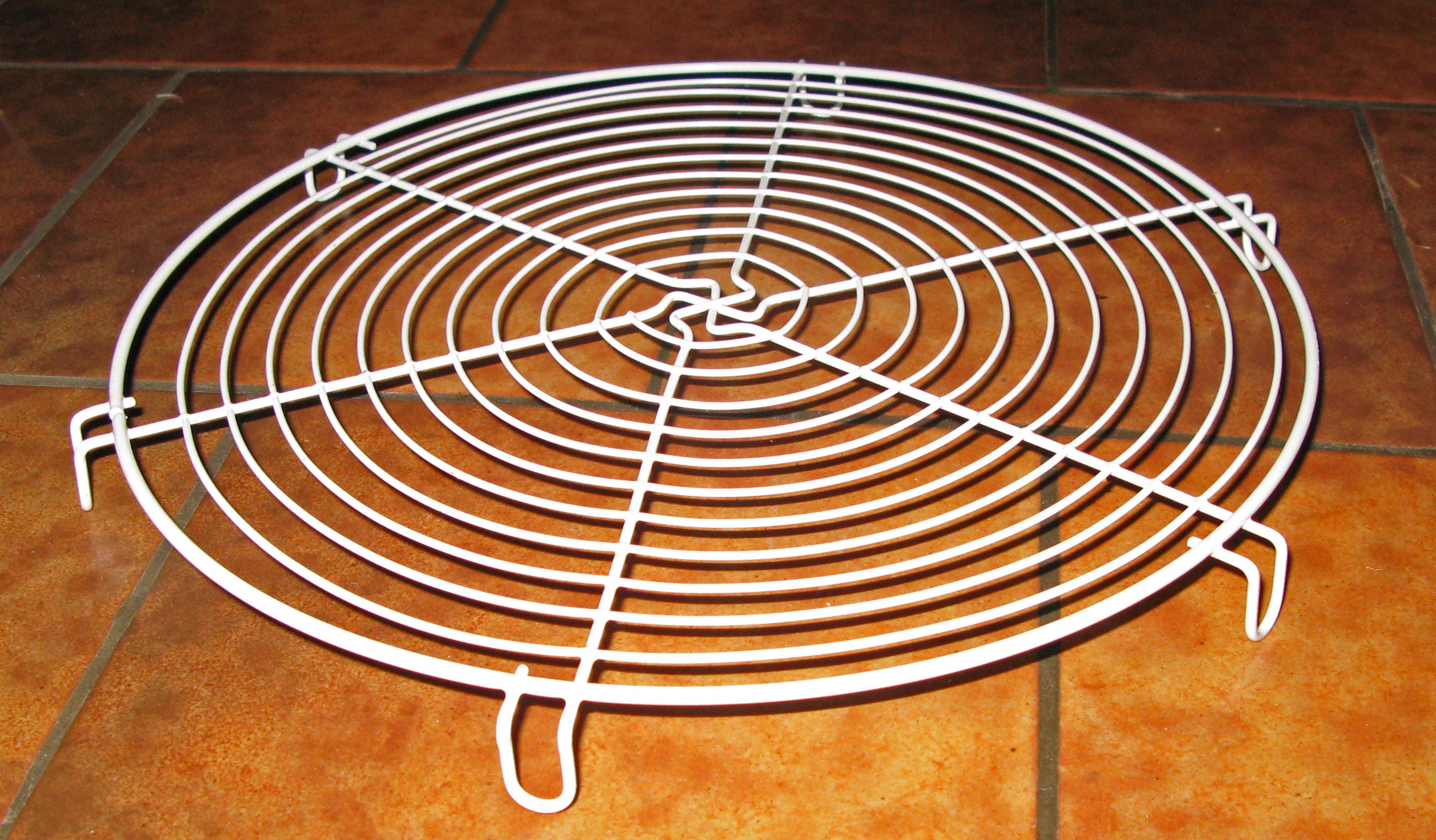 Huert.